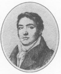 French sinologist Jean-Pierre Abel-Rémusat (1788-1832)